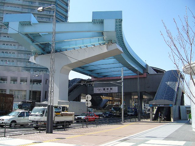 ゆりかもめ豊洲駅駅舎